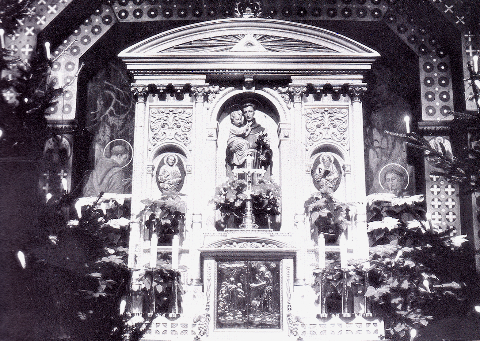 Römisch-katholische Pfarrkirche St. Antonius Egg, Hochaltar 1926